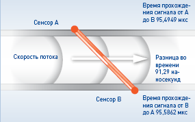 Принцип ультразвукового измерения расхода